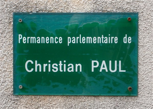 Permanence parlementaire de Christian Paul à Lormes